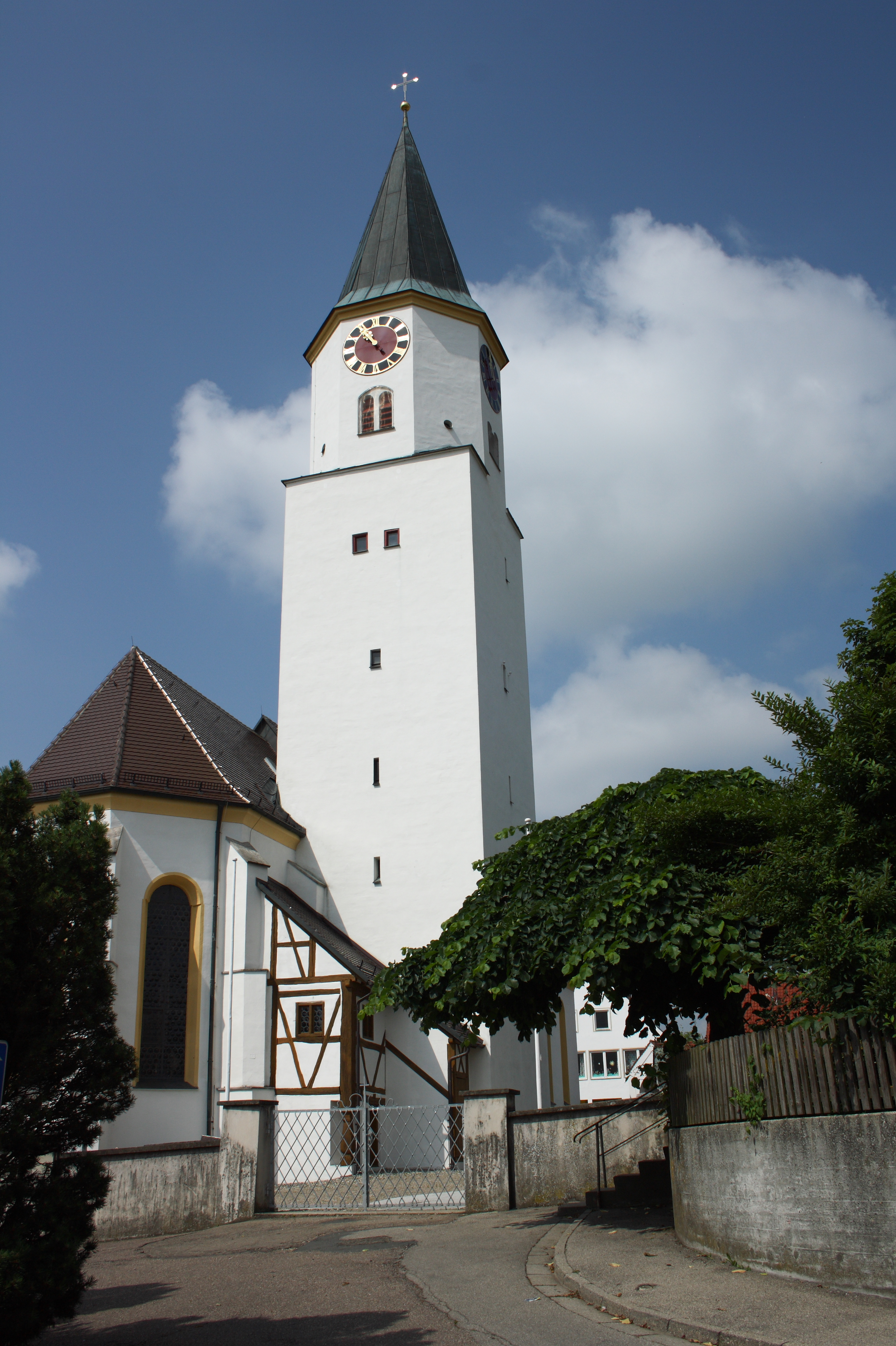 Katholische Pfarrkirche St. Ulrich in Rettenbach im Landkreis Günzburg (Bayern), im Kern 14./16. Jahrhundert, Turmoktogon mit Spitzhelm